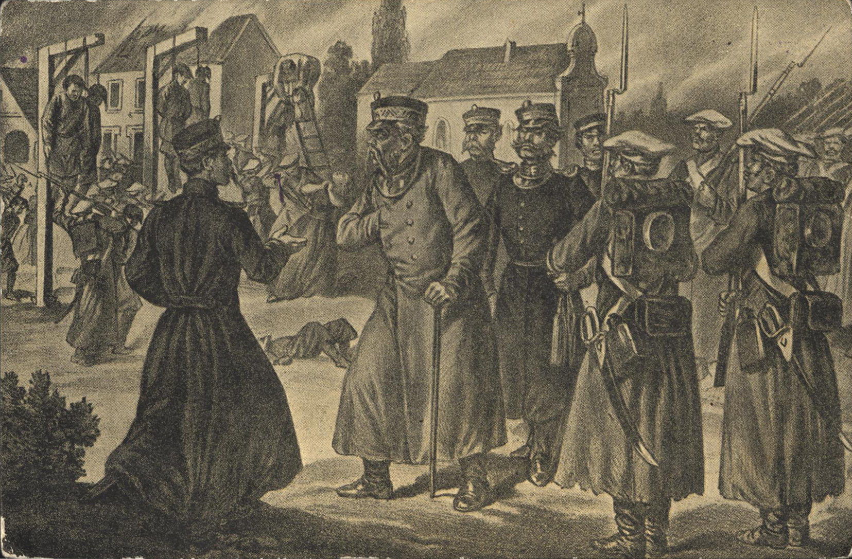 Беларуская (тарашкевіца): Вільня (Vilnia), Мураўёў-вешальнік